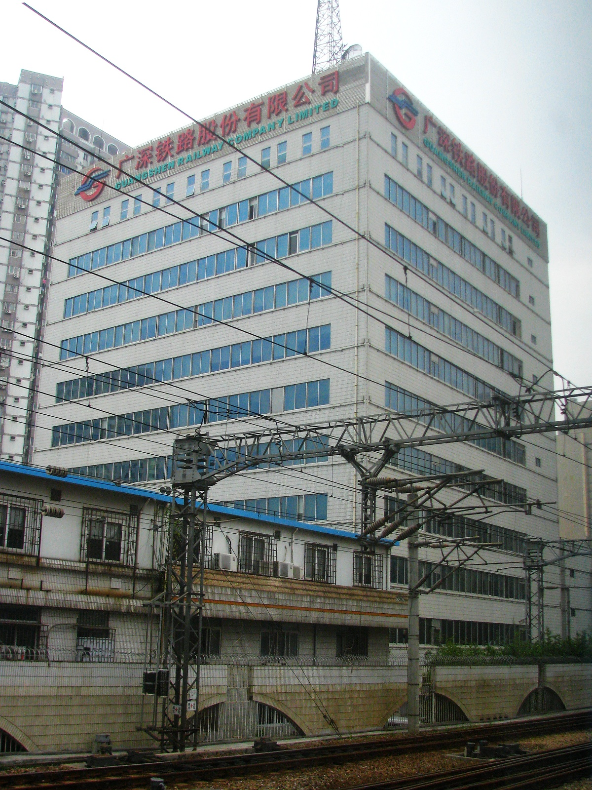 广深铁路股份有限公司总部大楼